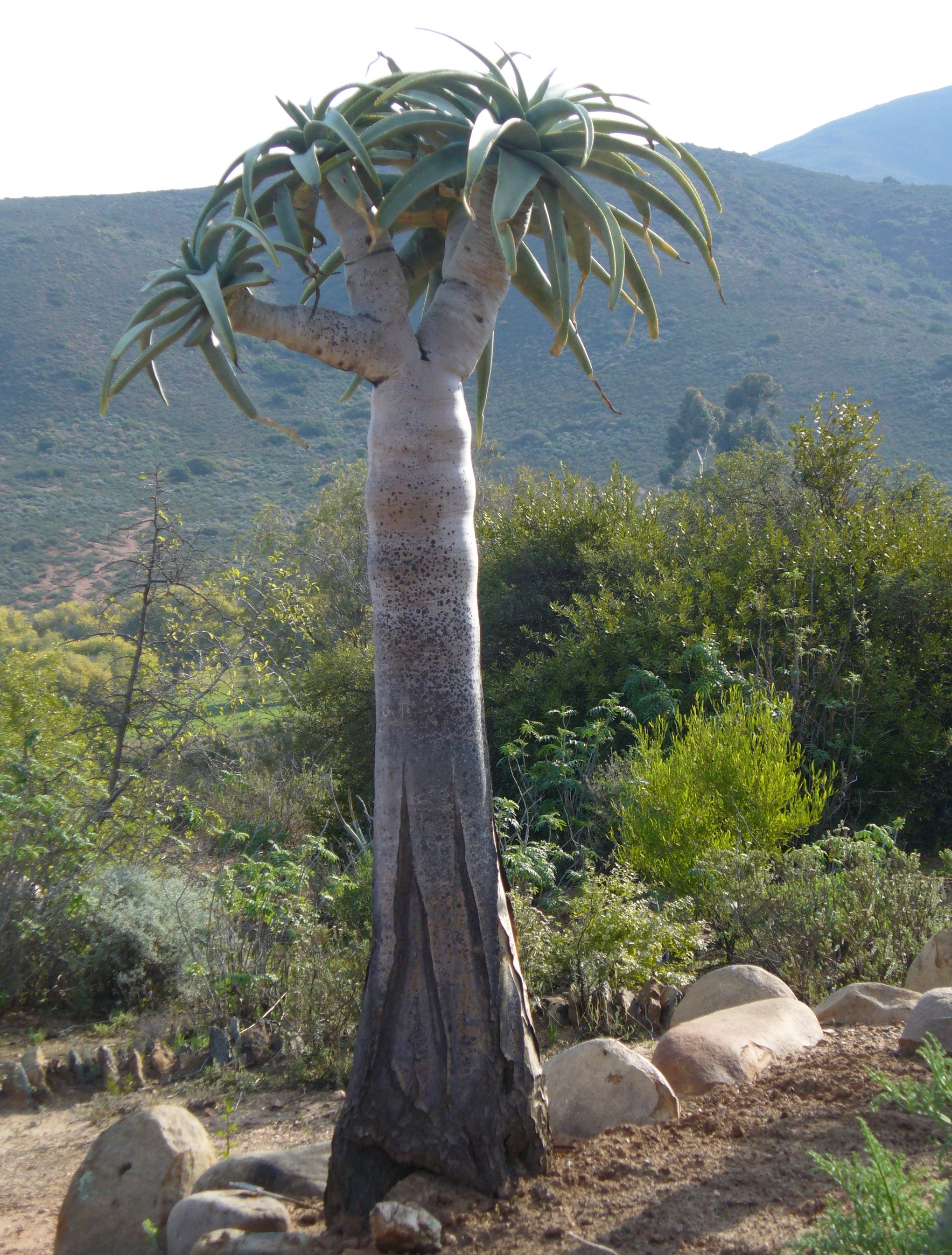 Aloe pillansii, Worcester Botanical Gardens Cape.